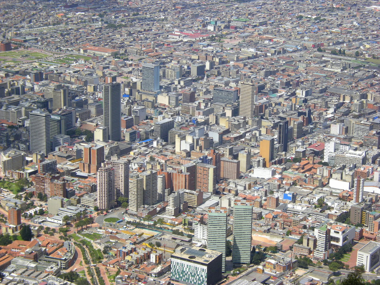 Vista del centro de Bogotá